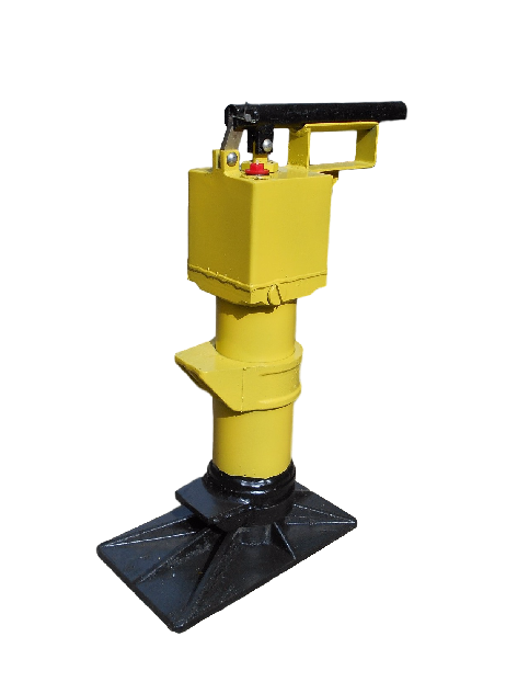 Домкрат путевой гидравлический ДПГ-20-200 производства ООО "Регион Ресурс"